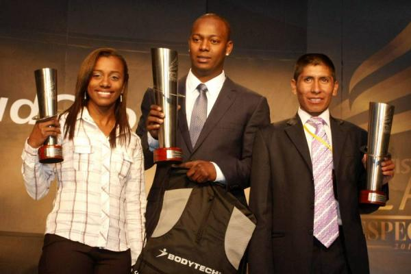 Premios el Espectador.